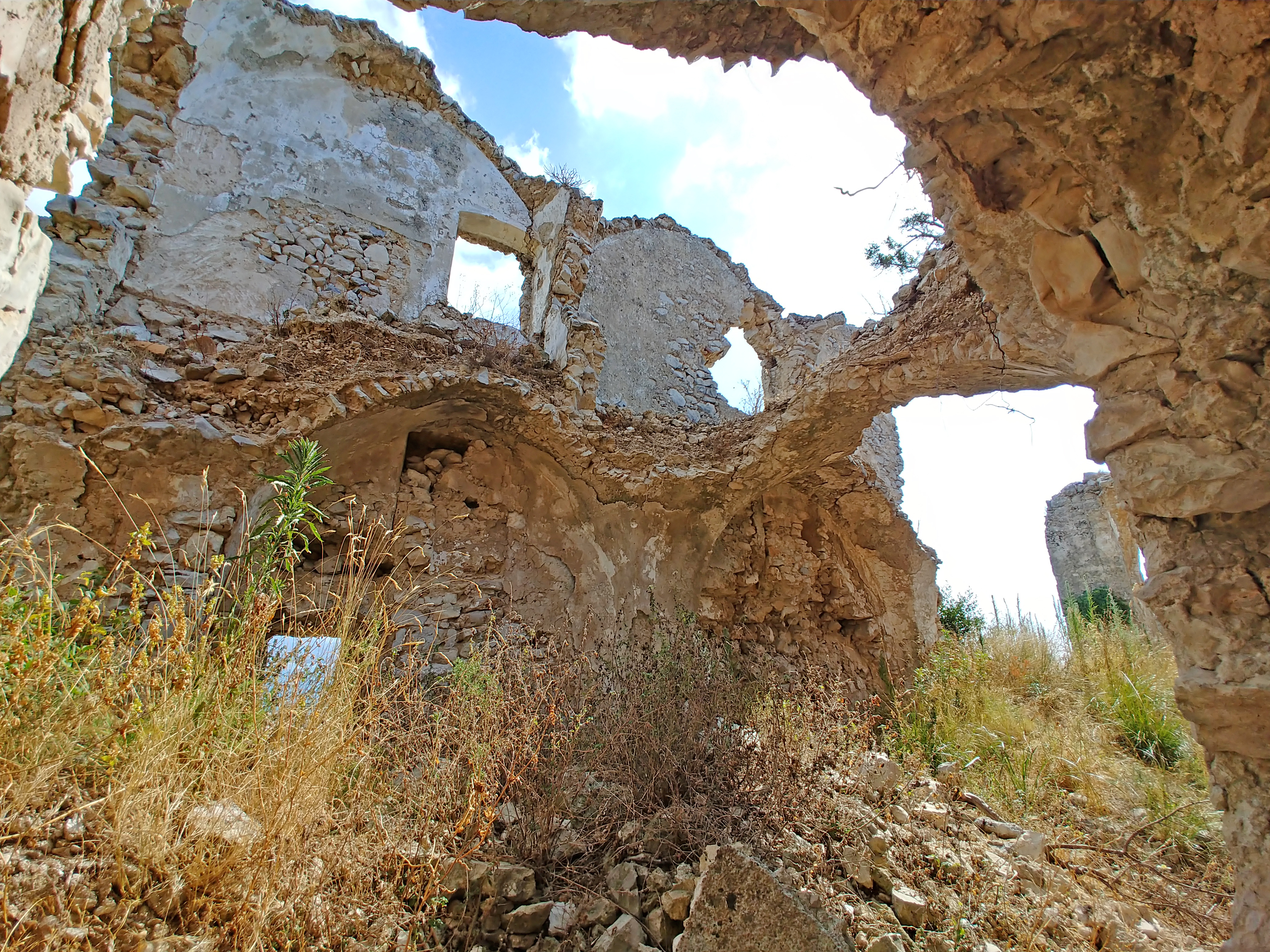 Ambienti dell'area nord-orientale.